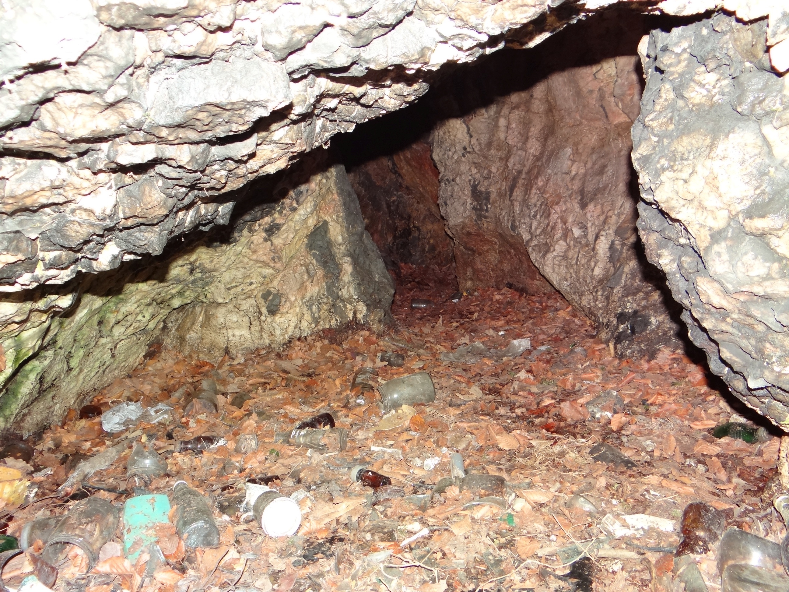 Jaskinia Szklana w Szklarach (w Bukowej Górze). Otwór pn.-zach.